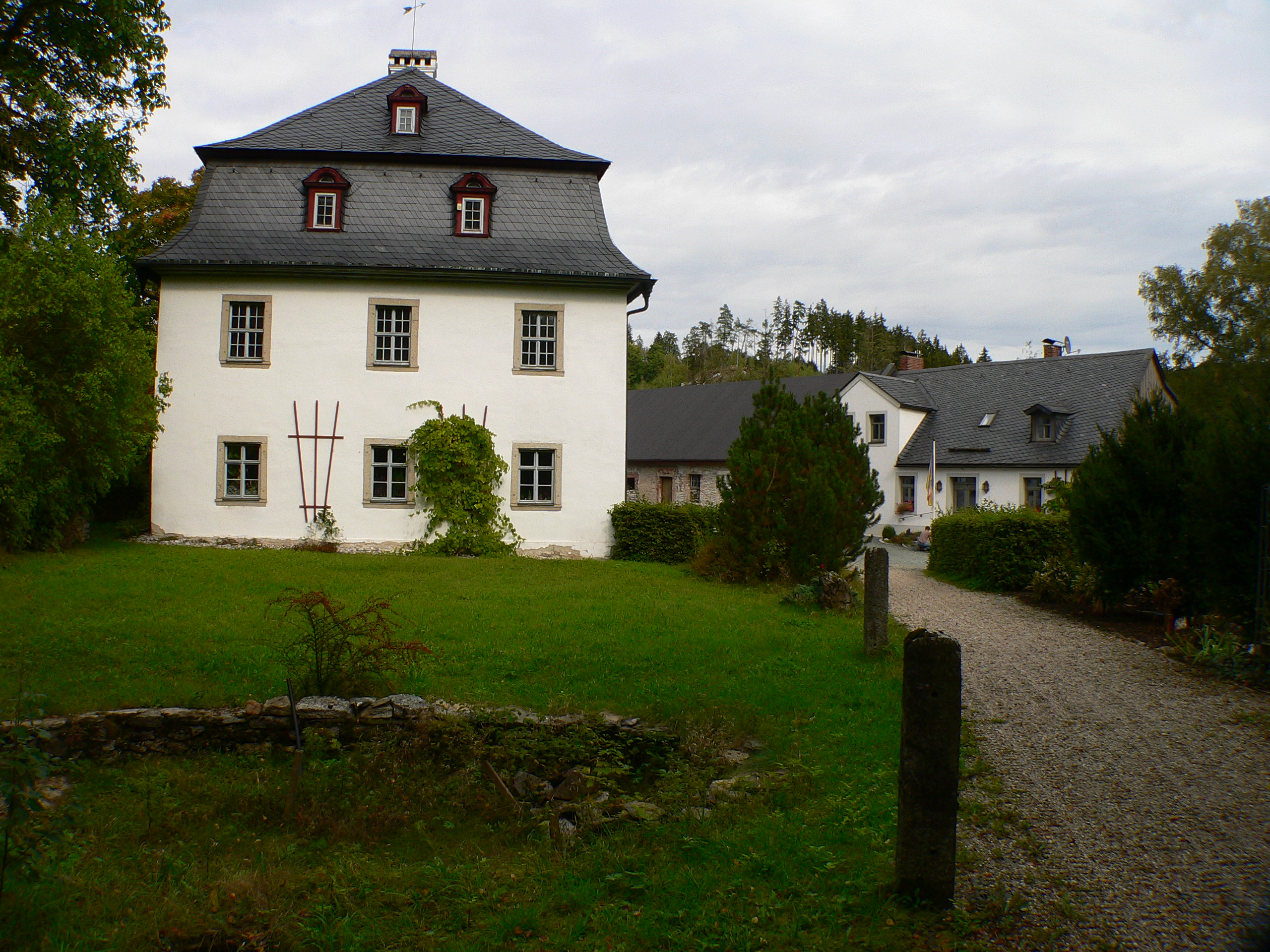 Herrensitz in Naila-Unterklingensporn, Bayern, Regierungsbezirk Oberfranken, Landkreis Hof